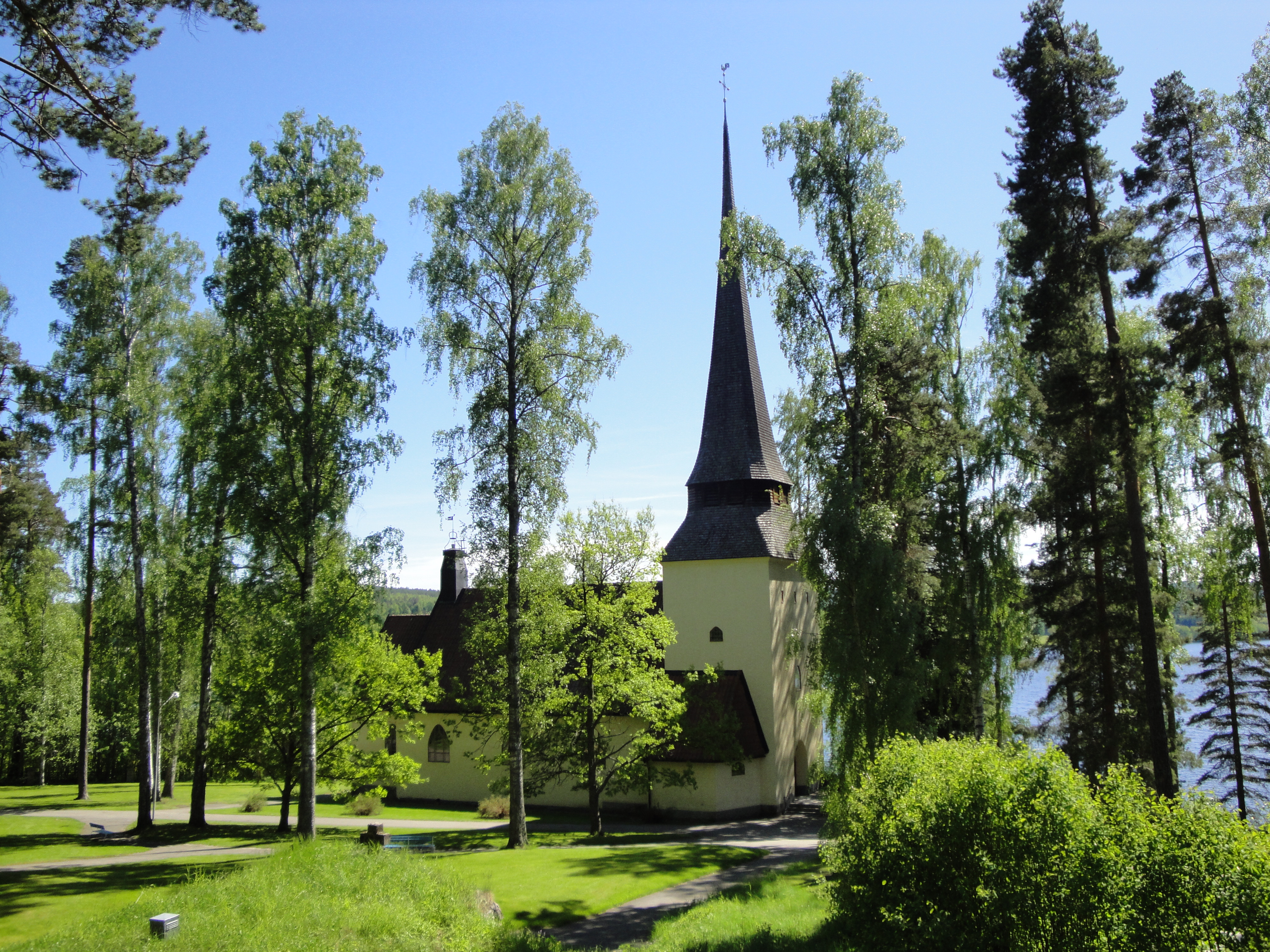 Bergviks kyrka, Söderhamns kommun